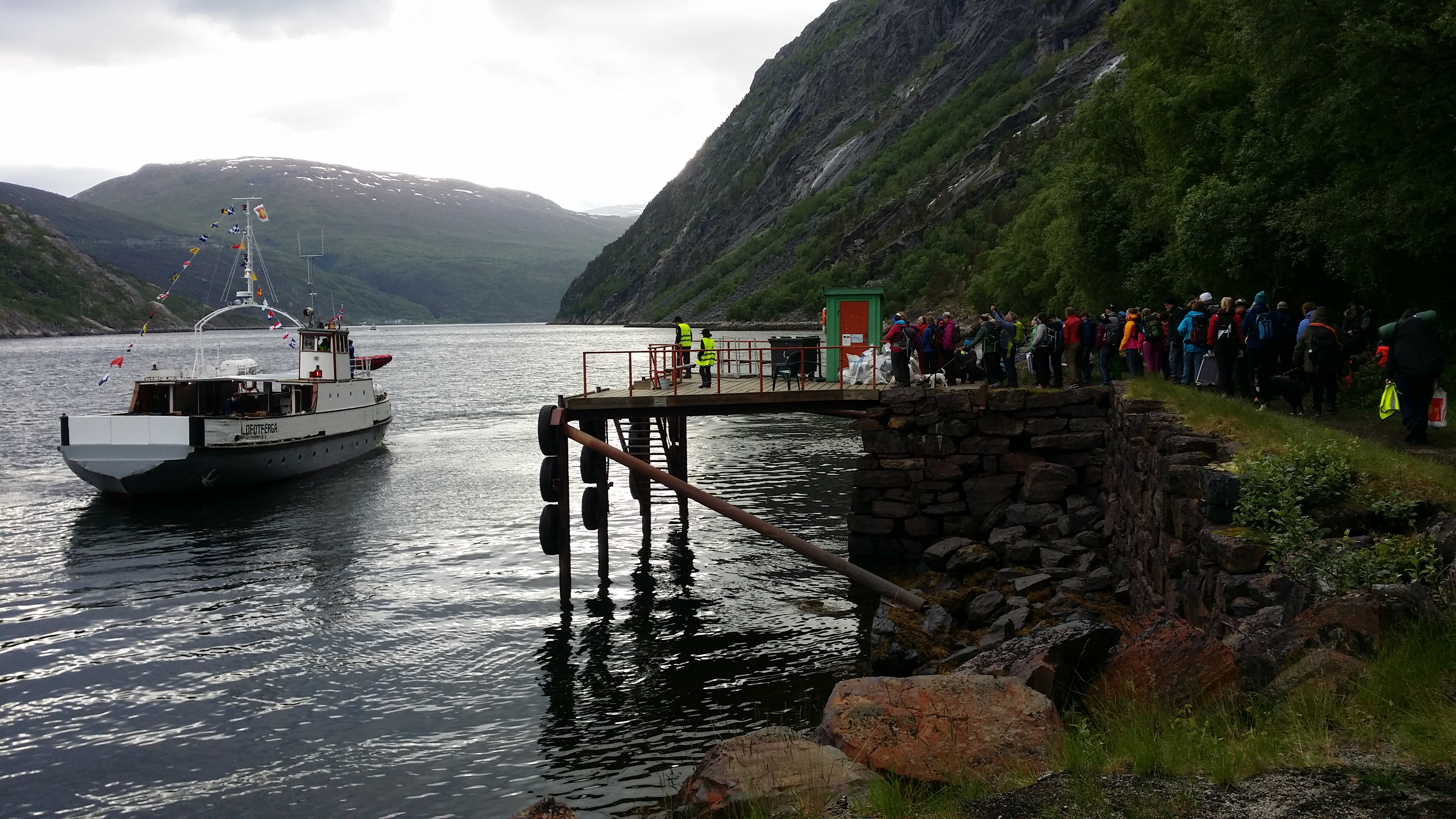 Gamle Lofotferga henter deltakere fra Svarta Bjørn-marsjen i Rombaksbotn.